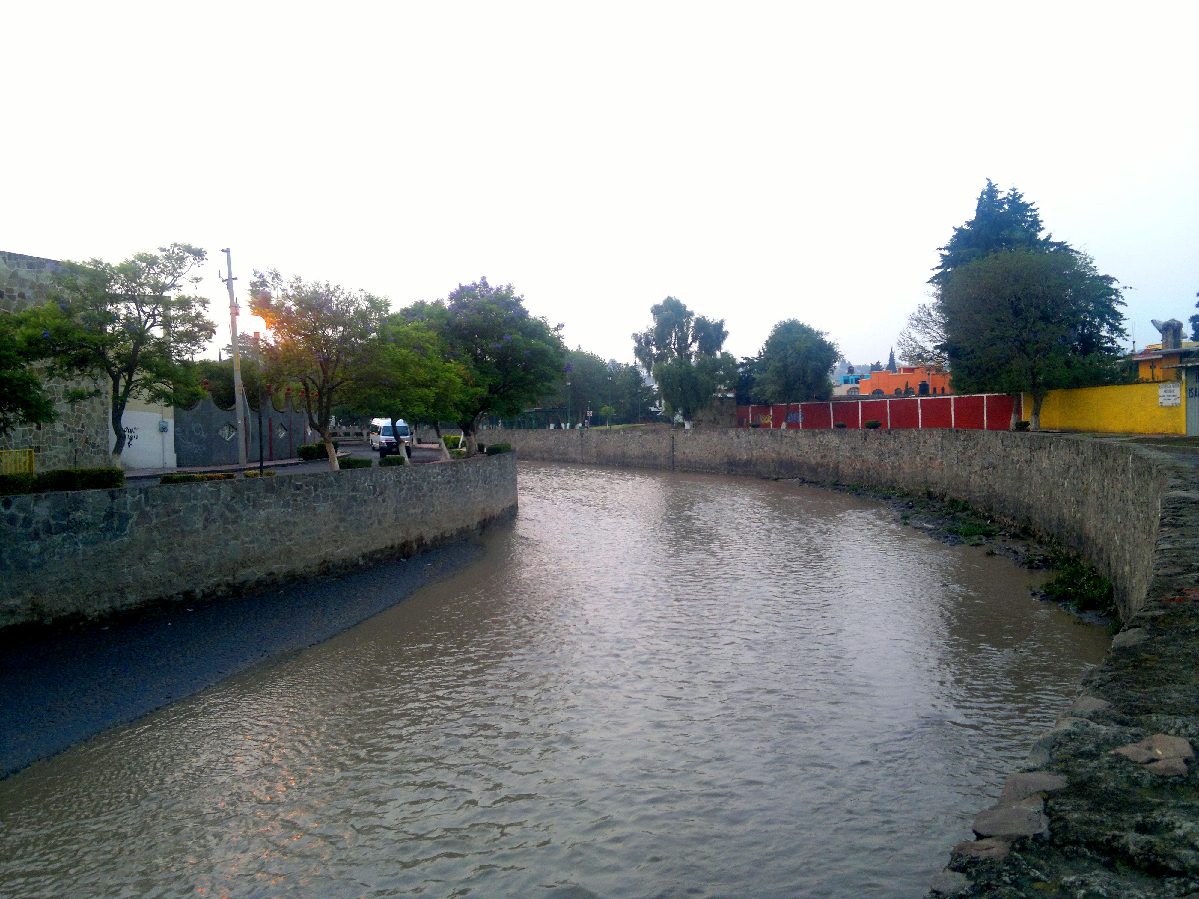 Centro, Tlaxcala de Xicohténcatl, Tlax., Mexico